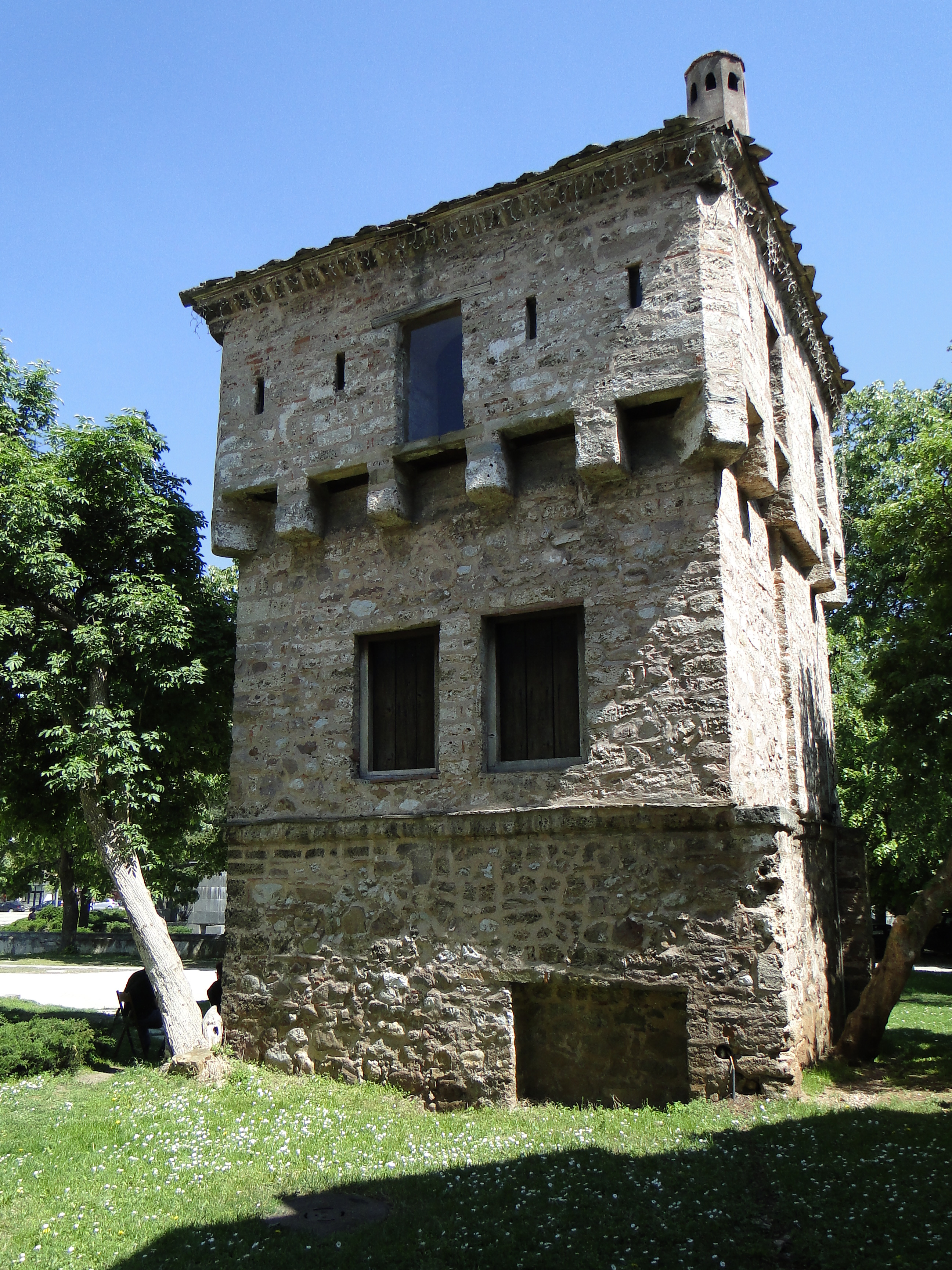 Враца